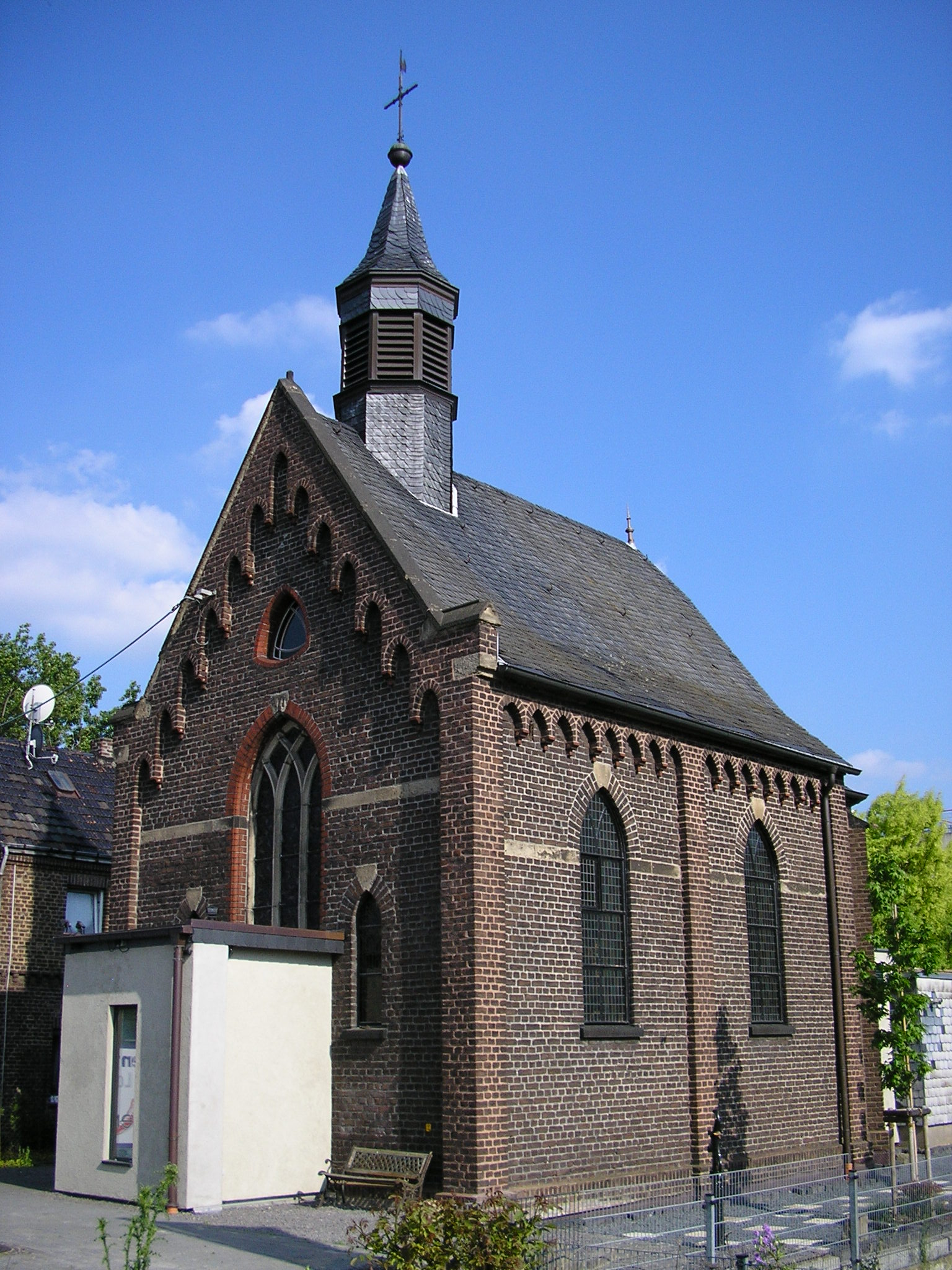 Dreifaltigkeitskapelle Köln-Marsdorf This is a photograph of an architectural monument.